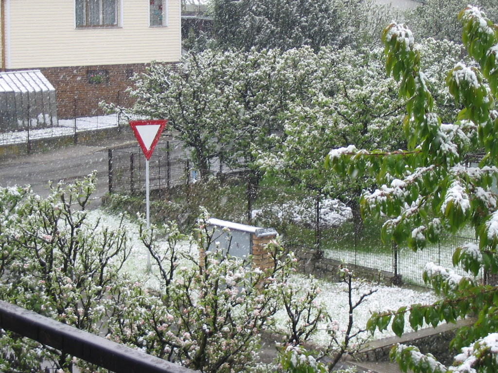 23. květen roku 2004, území ČR zasáhla studená fronta